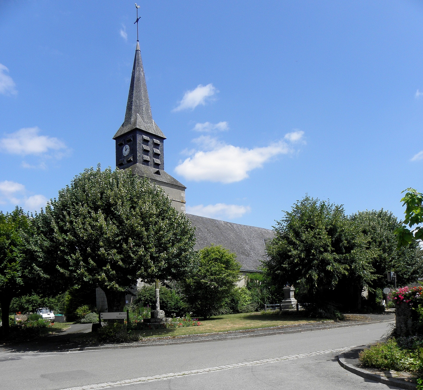 Église Saint-Loup de Saint-Loup-du-Gast (53). Façade occidentale et flanc sud.